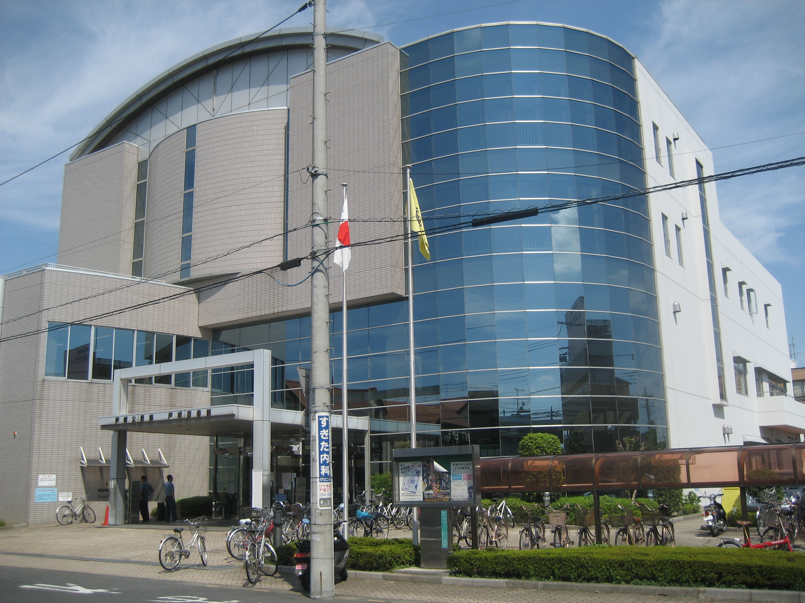 川口市立戸塚図書館